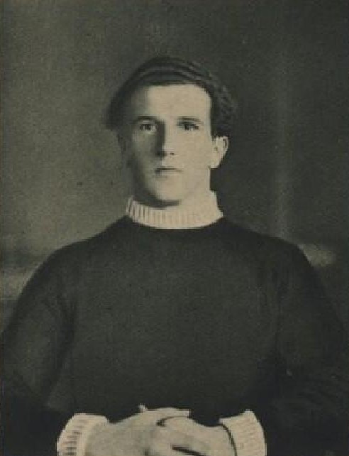 Franz Wende (1904-1968), československý lyžař[2], skokan, sdruženář a běžec